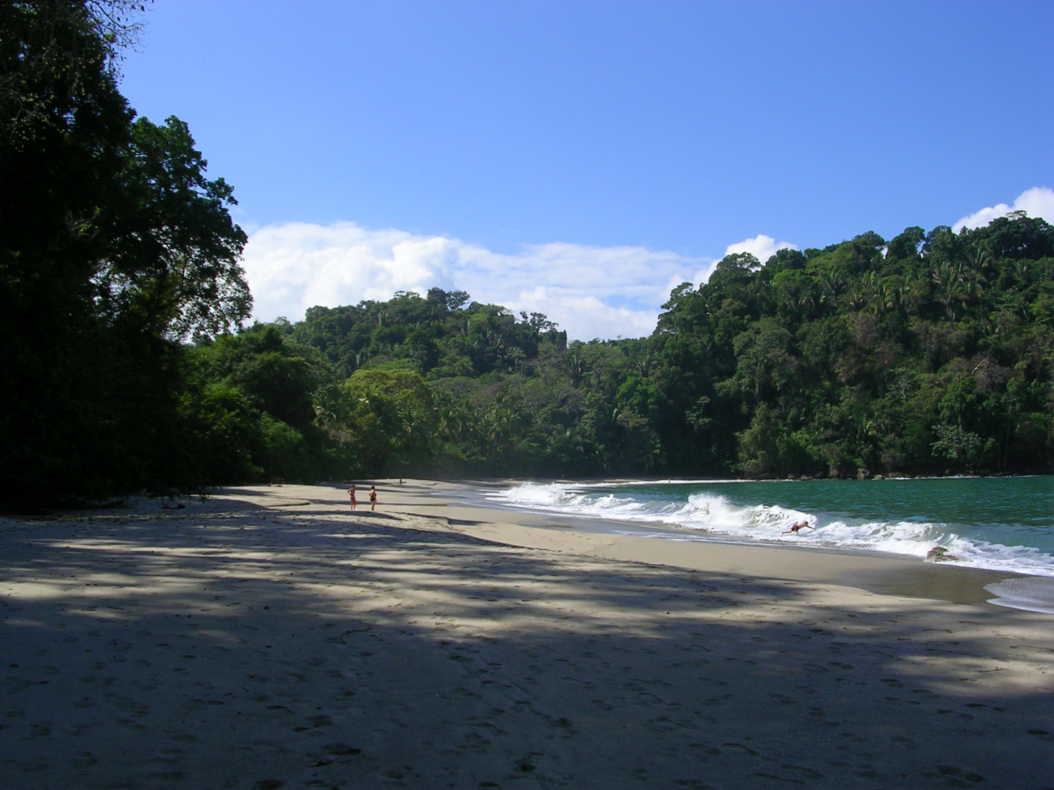 Nationalpark Manuel Antonio / Costa Rica